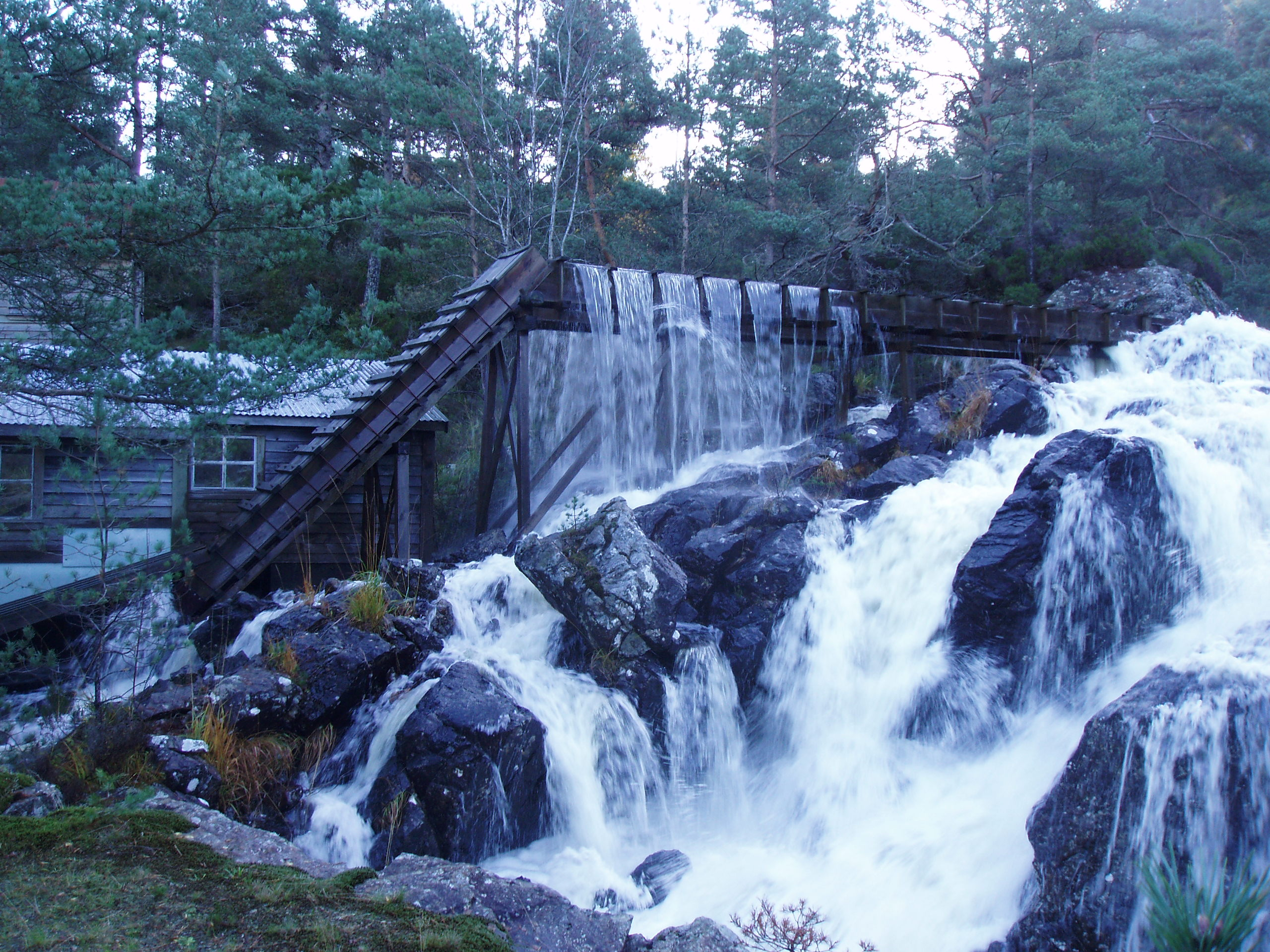 Det gamle sagbruket Rydlandssaga ved Sagelva på Fitjar.